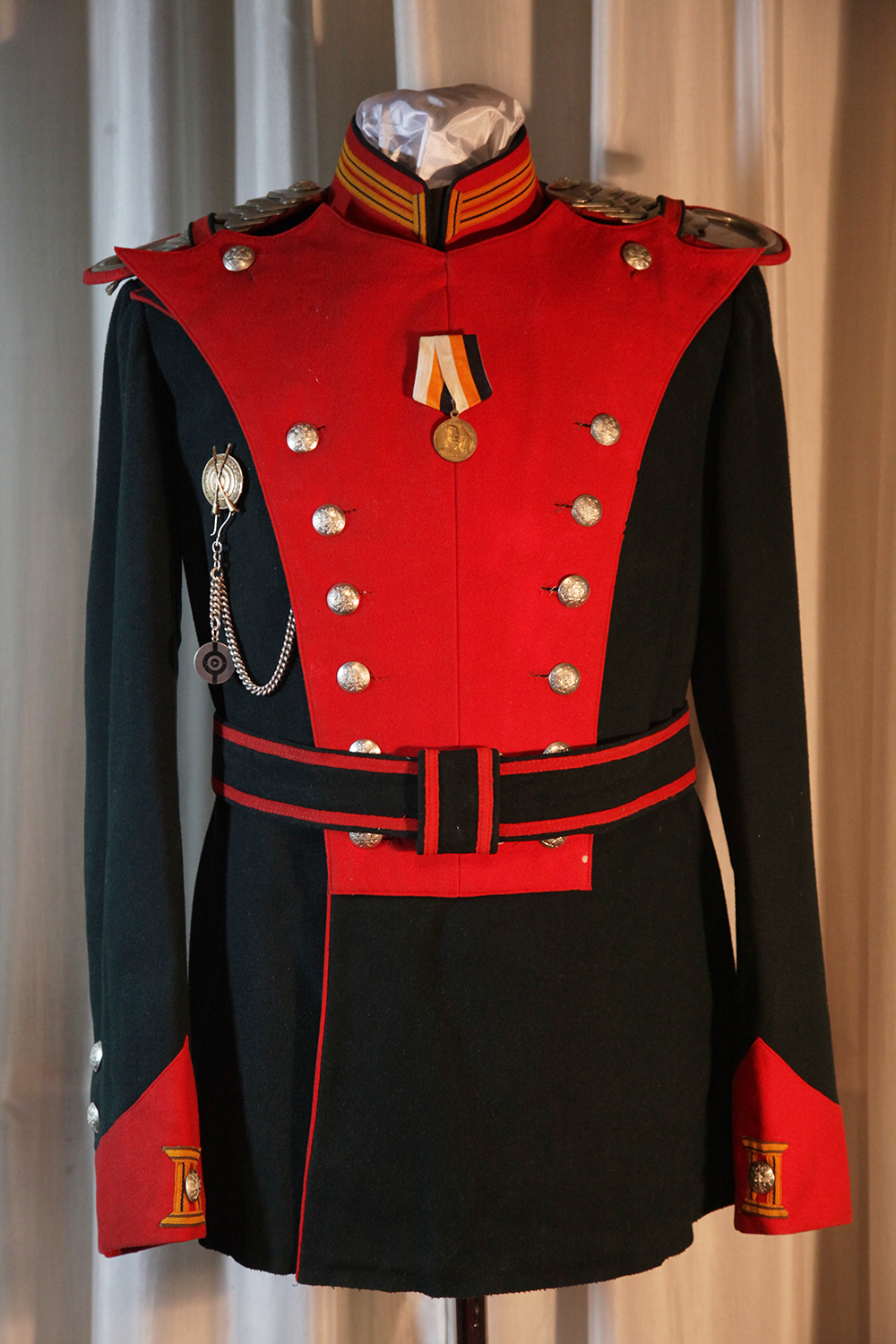 Мундир лейб-драгуна Лейб-Гвардии Драгунского полка с лацканом и знаками "За отличную стрельбу"1908-1917 гг.